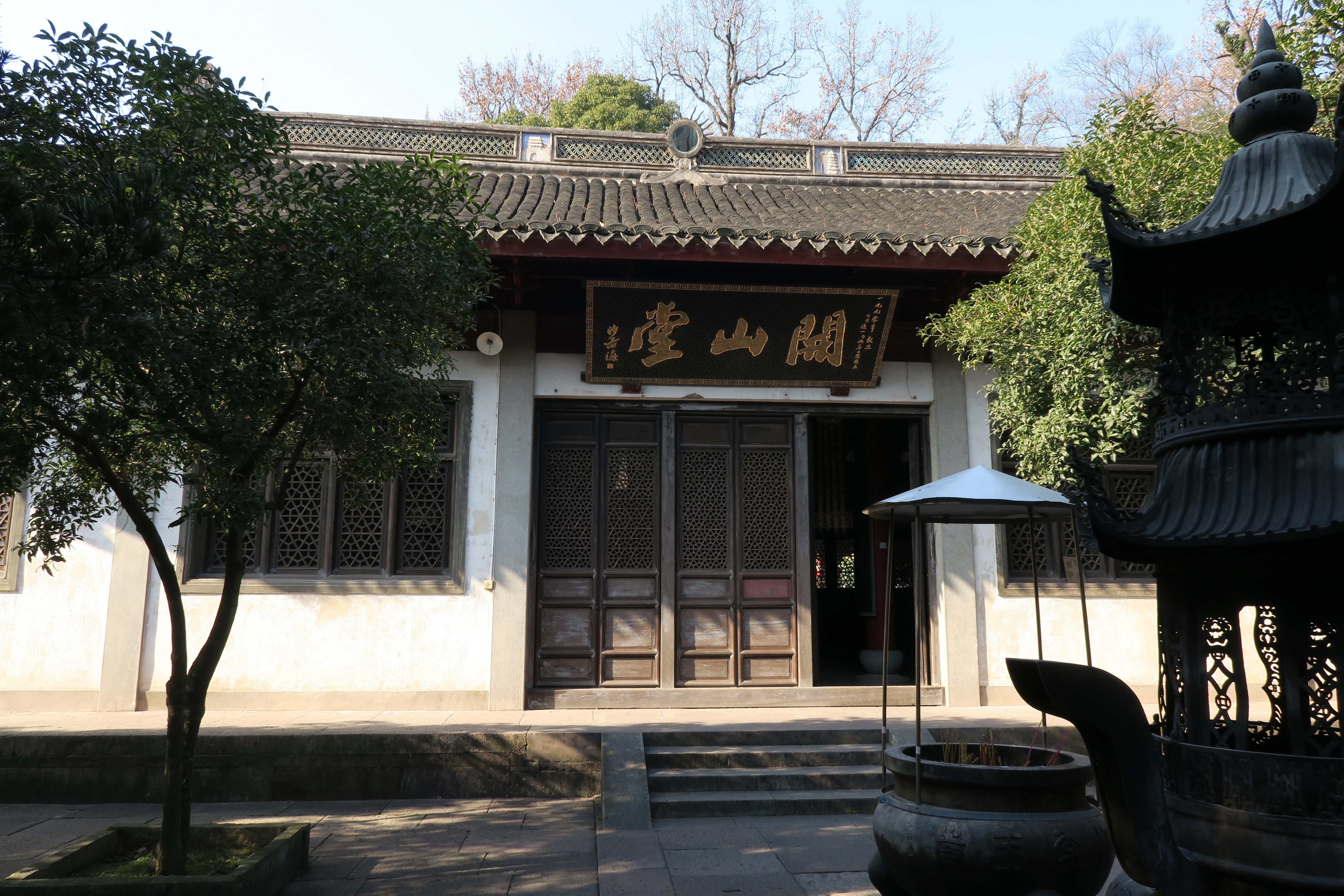 宁波阿育王寺